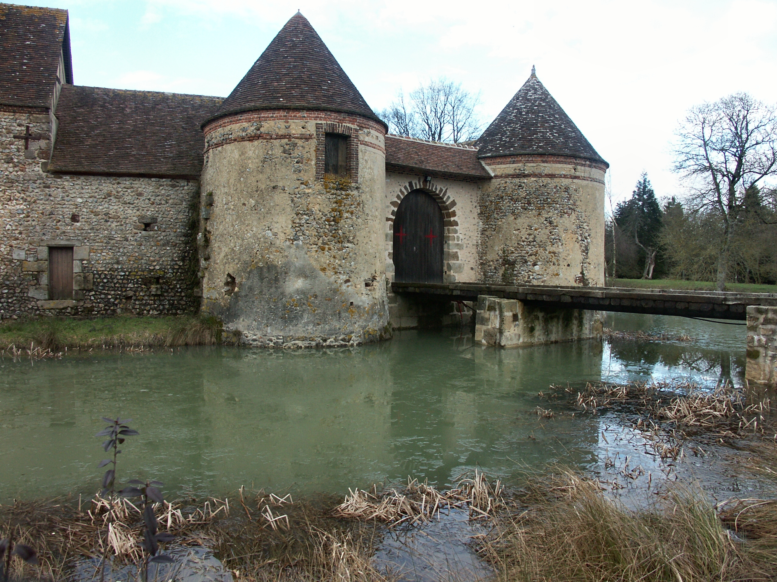 Château de La Ventrouze, XVIe siècle .